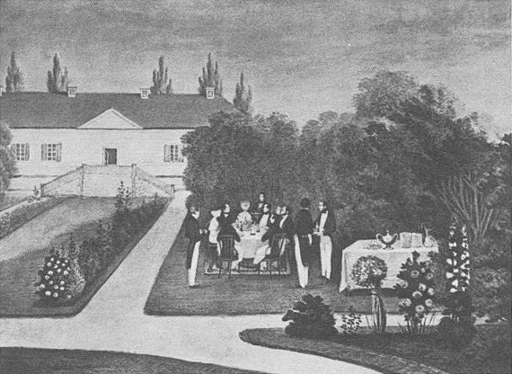 Беларуская (тарашкевіца): Завушша (Zavušša), сядзіба Мараўскіх (Maraŭski)